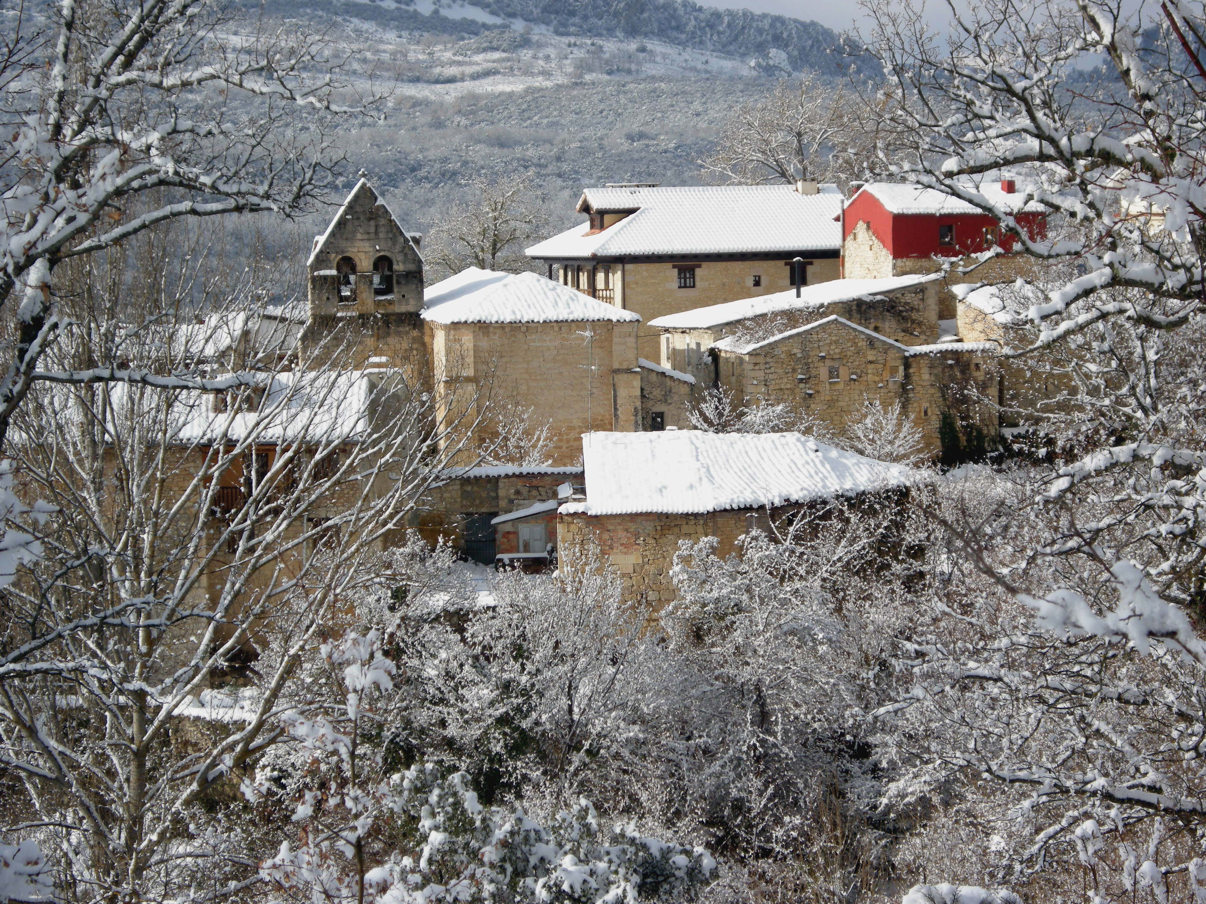 Peñalva nevado